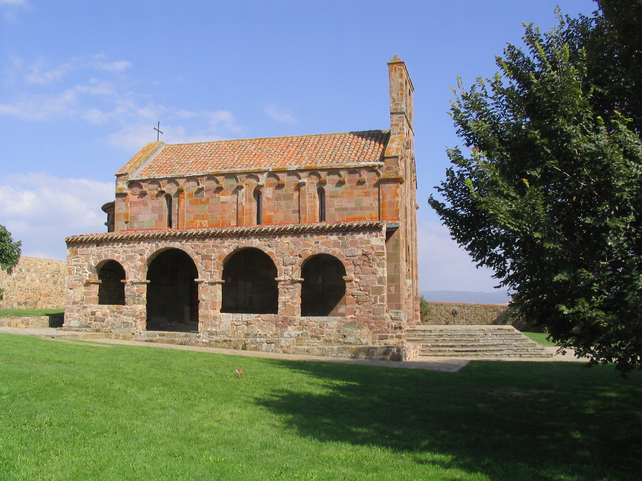 Església romànica de Nostra Signora di Castro. Sardenya